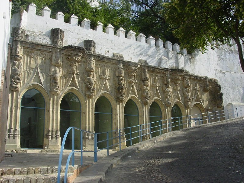 Las Covachas o Las Tiendas de las Sierpes, Sanlúcar de Barrameda (España). Constituyen un inmueble del gótico civil datable en torno al tránsito de los siglos XV al XVI destacable por su fachada pétrea ornamentada con figuras zoomorfas aladas.